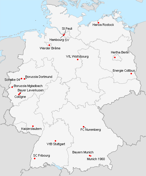 Répartition des clubs en 1.Bundesliga 2001-2002.